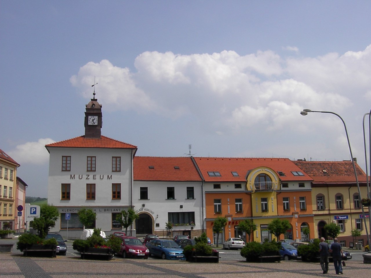 Sedlčanské muzeum ve staré radnici